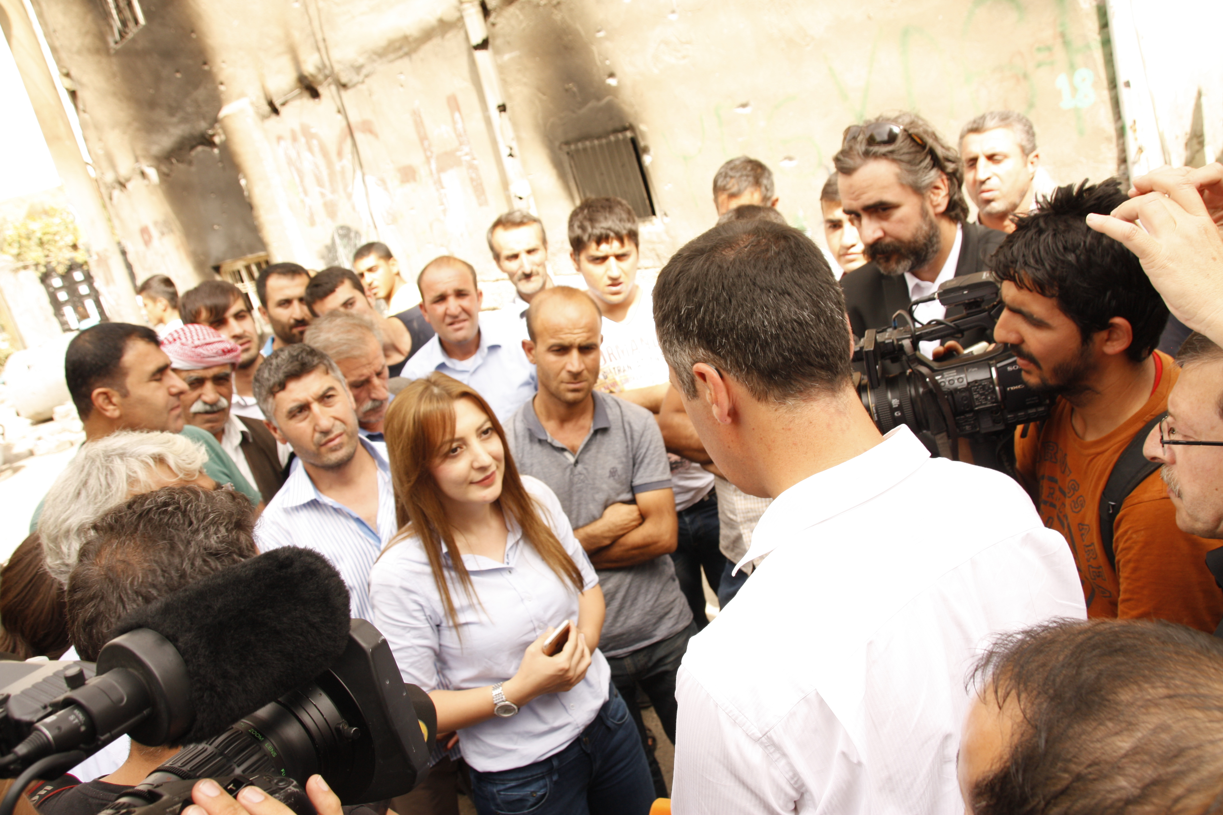 Birlik 90Yeşiller eşbaşkanı Cem Özdemir'in Leyle İmret ile görüşmesi